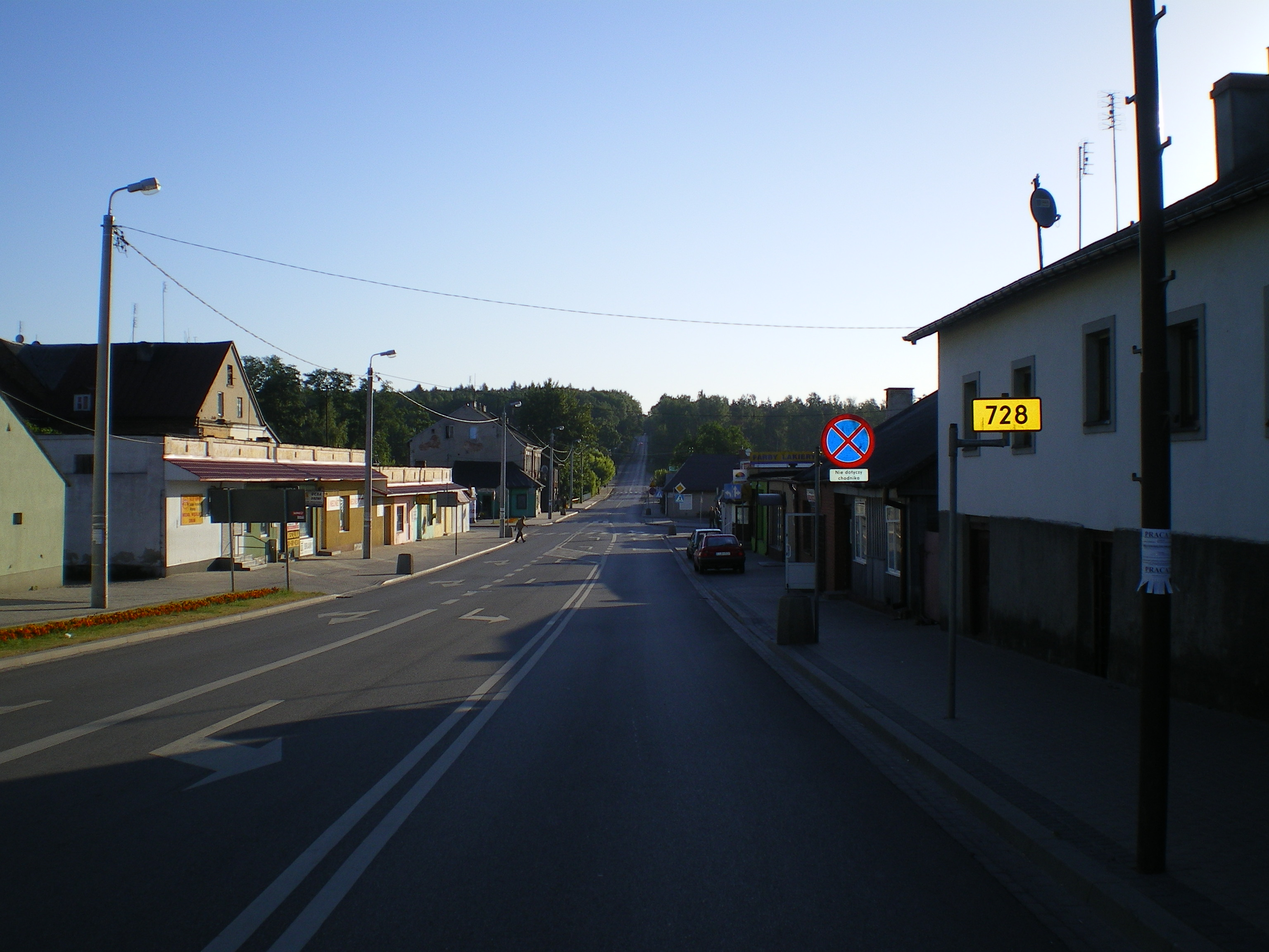 Droga 728 widziana ze skrzyżowania dróg Dziarnowskiej oraz Grójeckiej w Mogielnicy